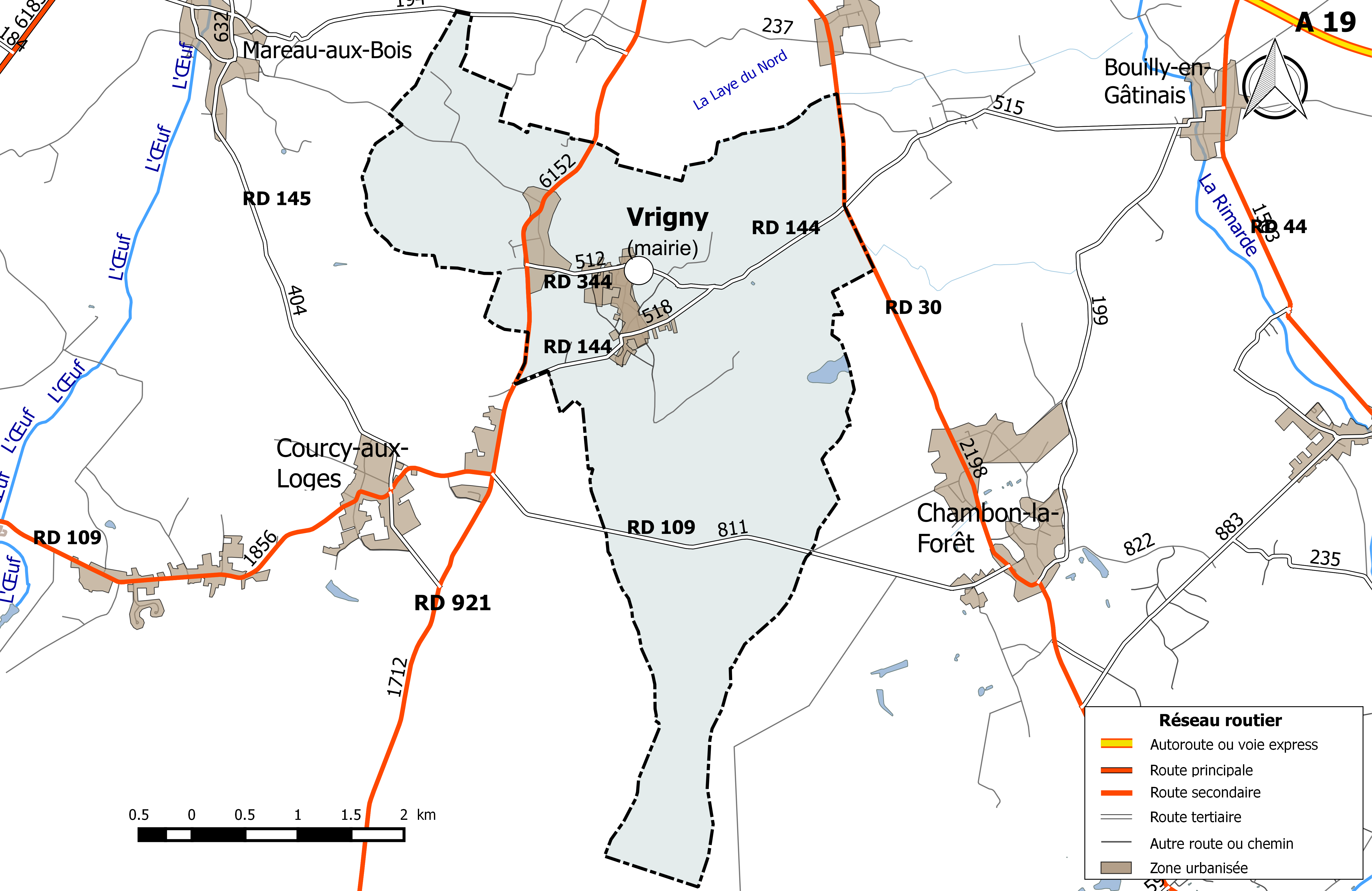 Carte du réseau routier de la commune de Vrigny (Loiret).